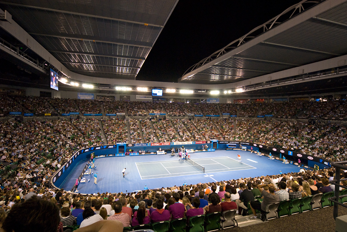 Rafael Nadal Vs Philipp Kohlschreiber